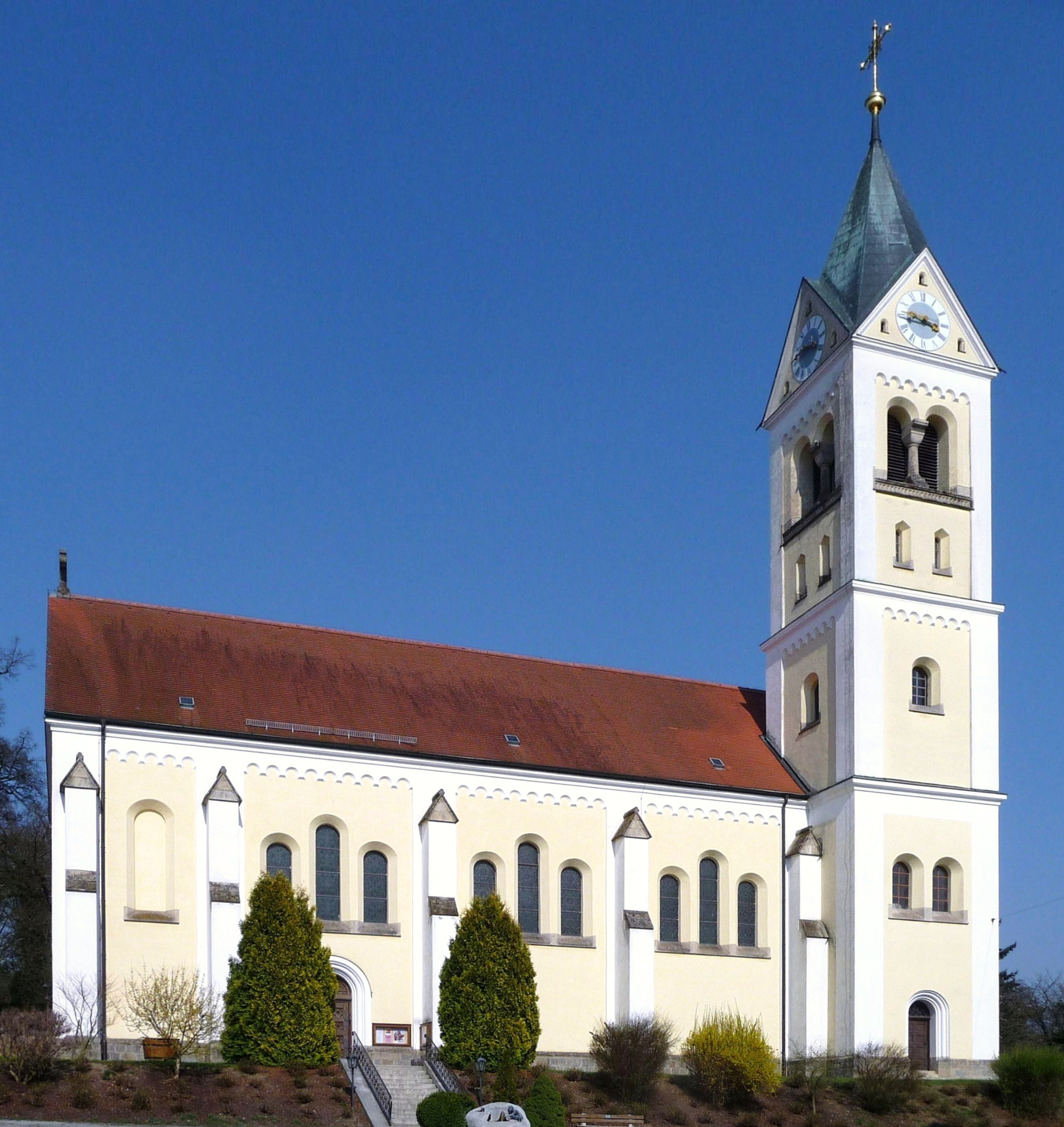 Die katholische Pfarrkirche Maria Himmelfahrt in Ortenburg. Bauzeit 1892 bis 1894, Architekt Johann Baptist Schott.